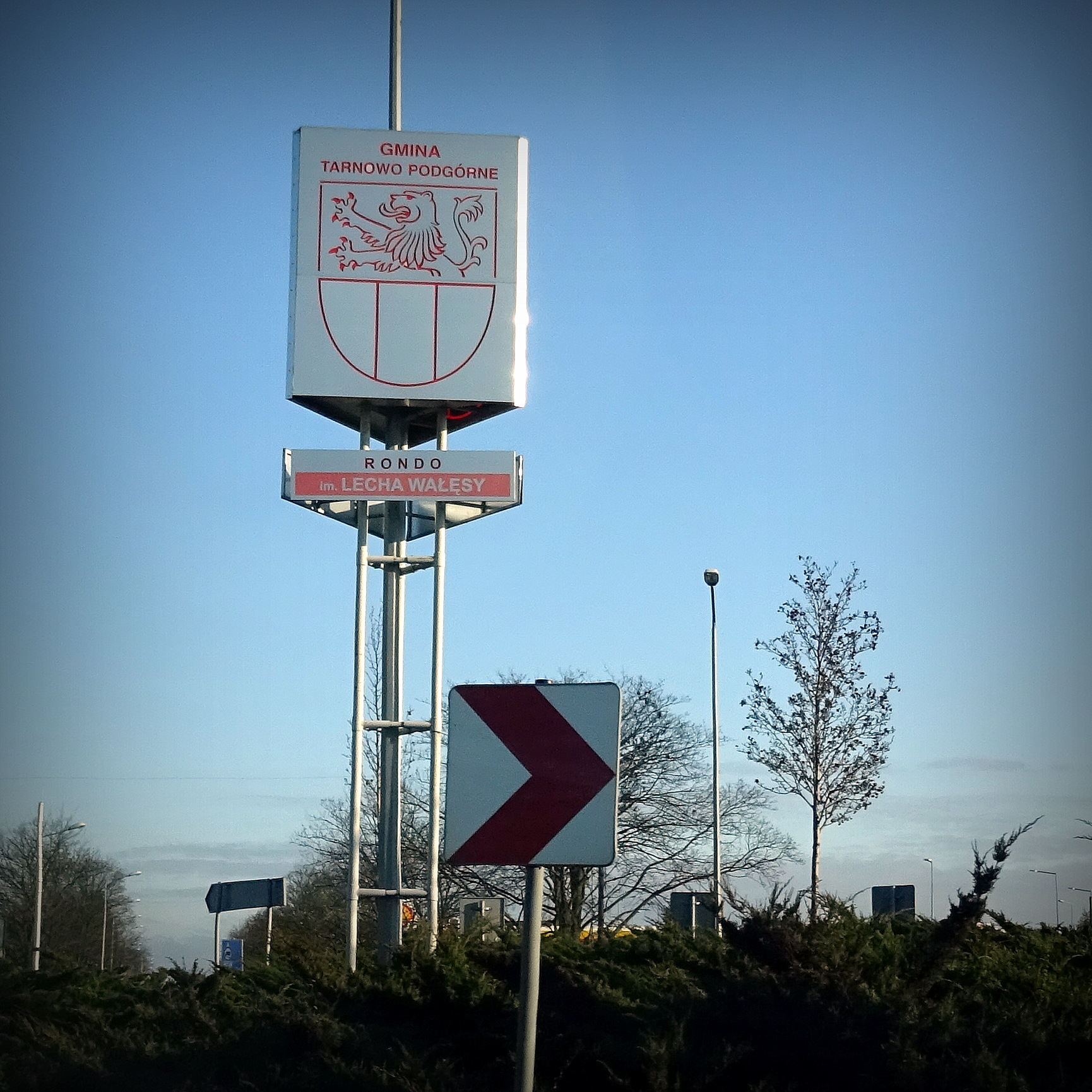 Rondo im. Lecha Wałęsy w Tarnowie Podgórnym w aglomeracji poznańskiej, na drodze krajowej nr 92 (ul. Poznańska).